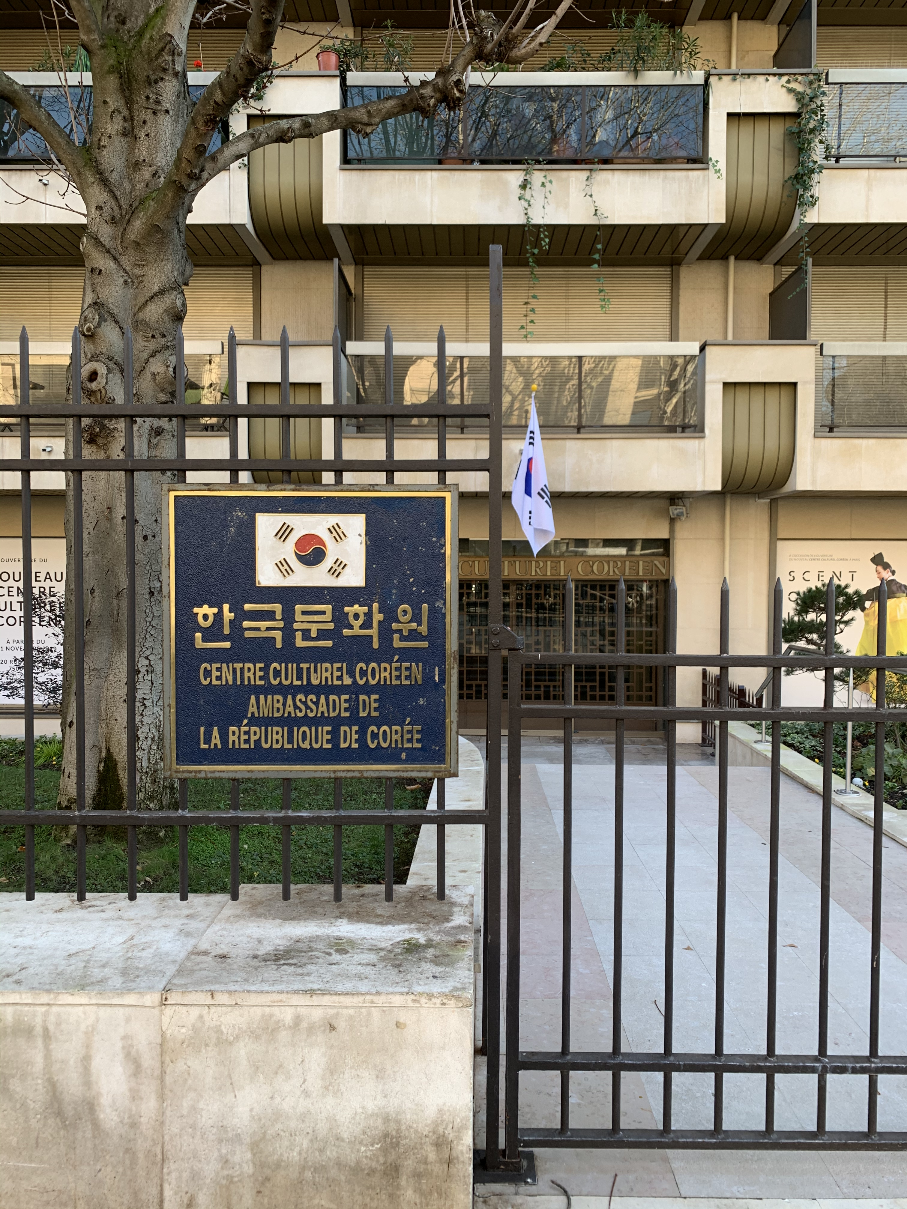 Centre culturel coréen (Paris) en janvier 2020.